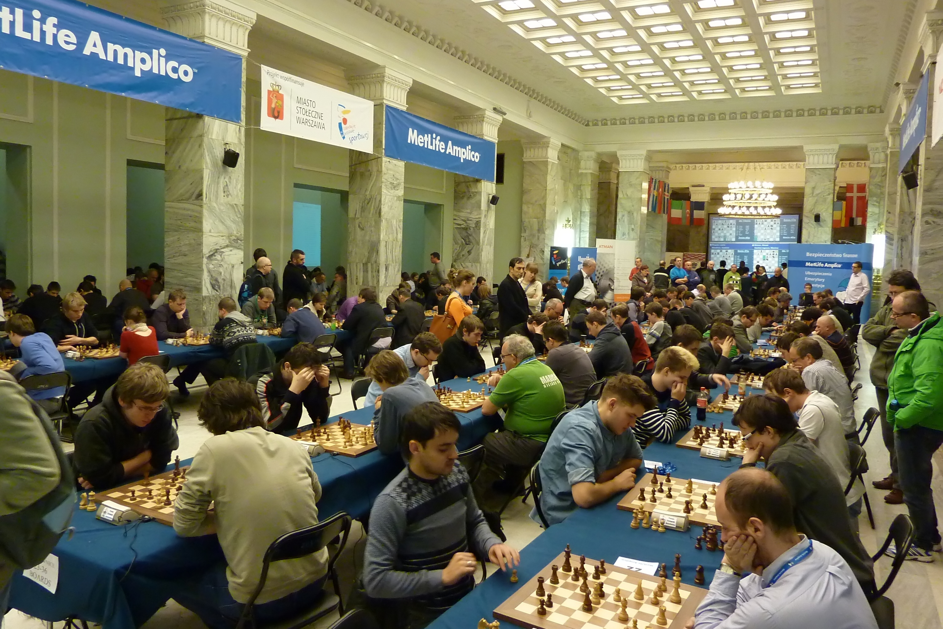 Memoriał Stanisława Gawlikowskiego (turniej szachów szybkich), Warszawa 2012.